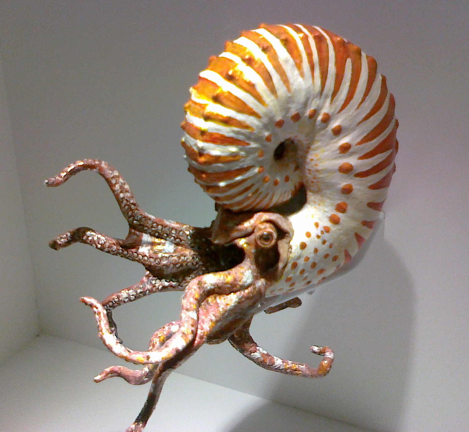 ricostruzione di ammonite nel Houston Museum of Natural Science